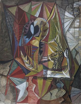 RYLSKY (1901-1970), Ange cousant un poème à la machine, 1946, huile sur toile